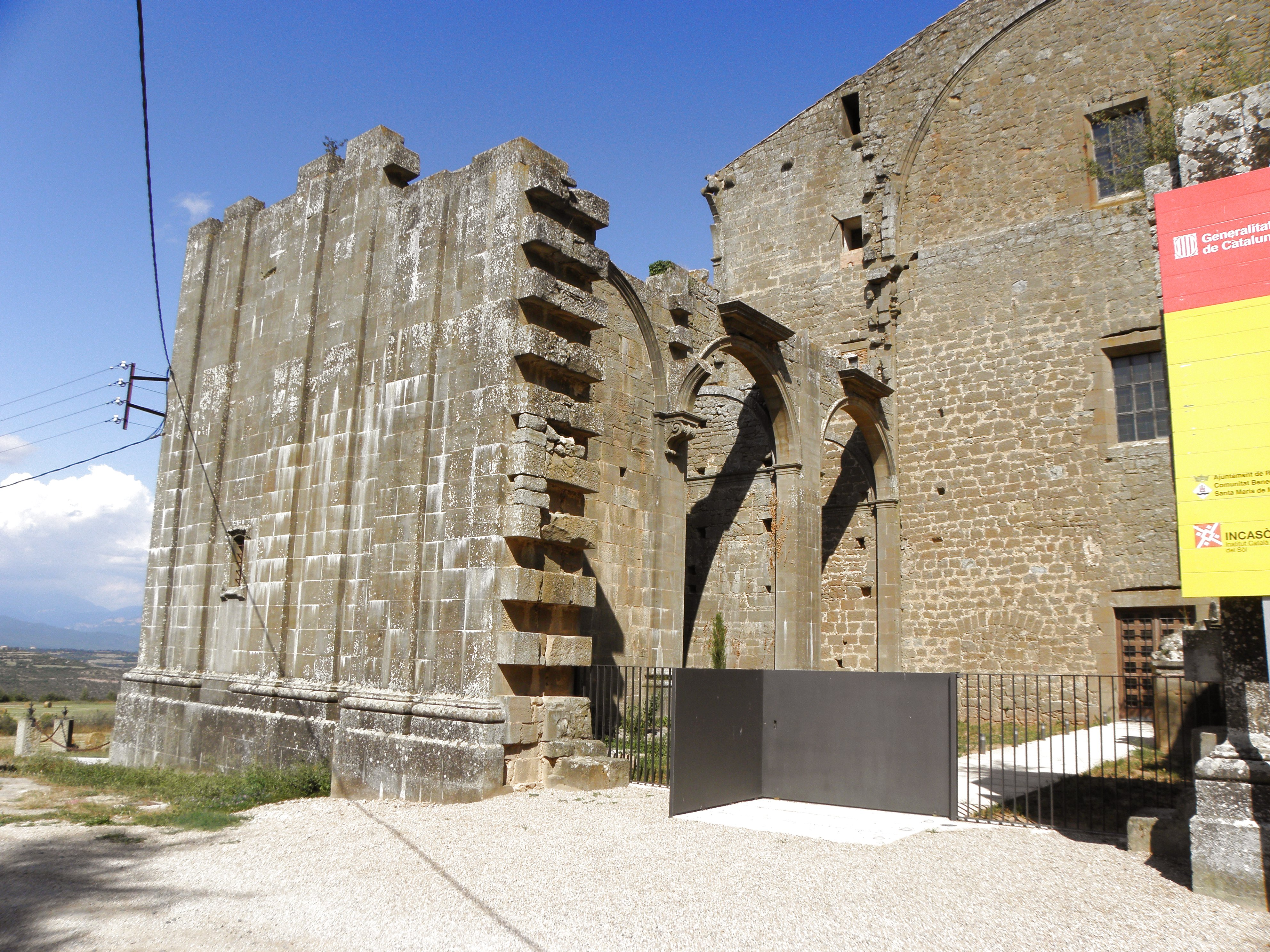 La part inacabada de l'església del Santuari del Miracle (Riner, Solsonès)